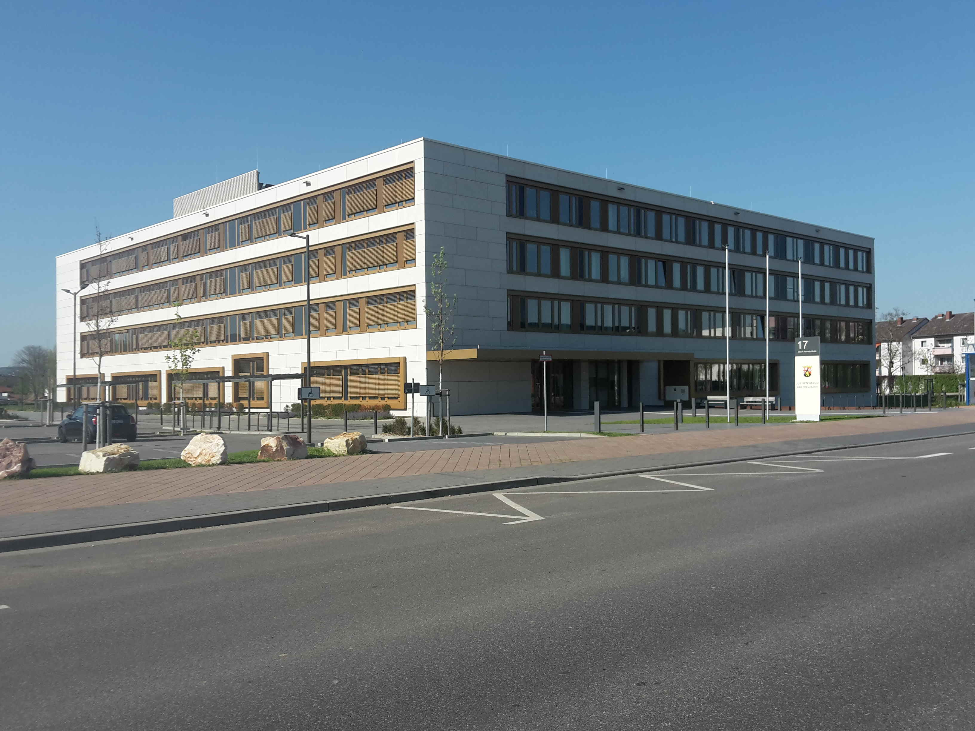 Neues Justizzentrum in Bad Kreuznach, Ende 2017 eingeweiht